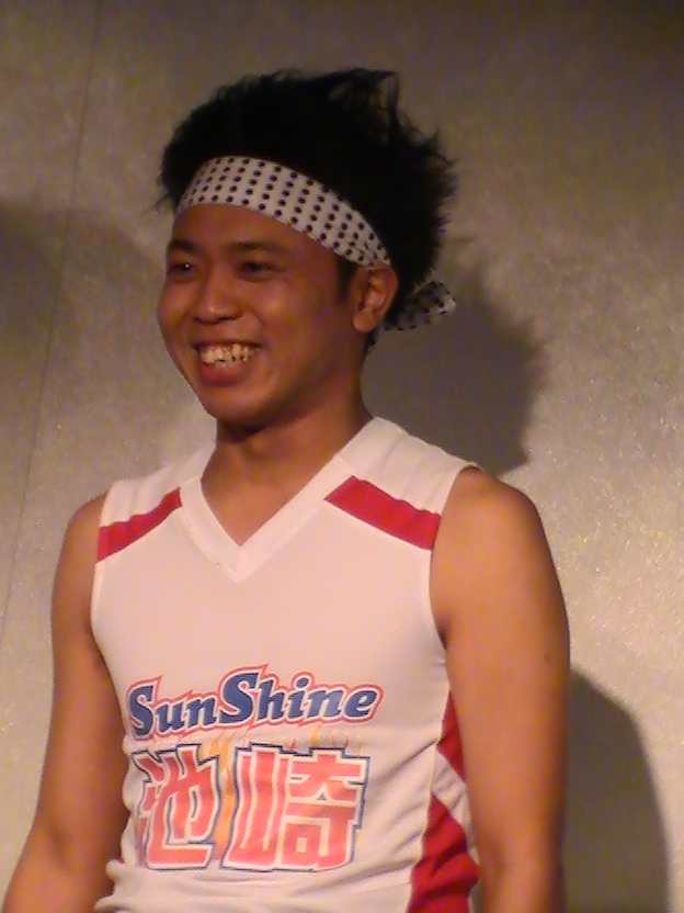 サンシャイン池崎 (2016年2月)